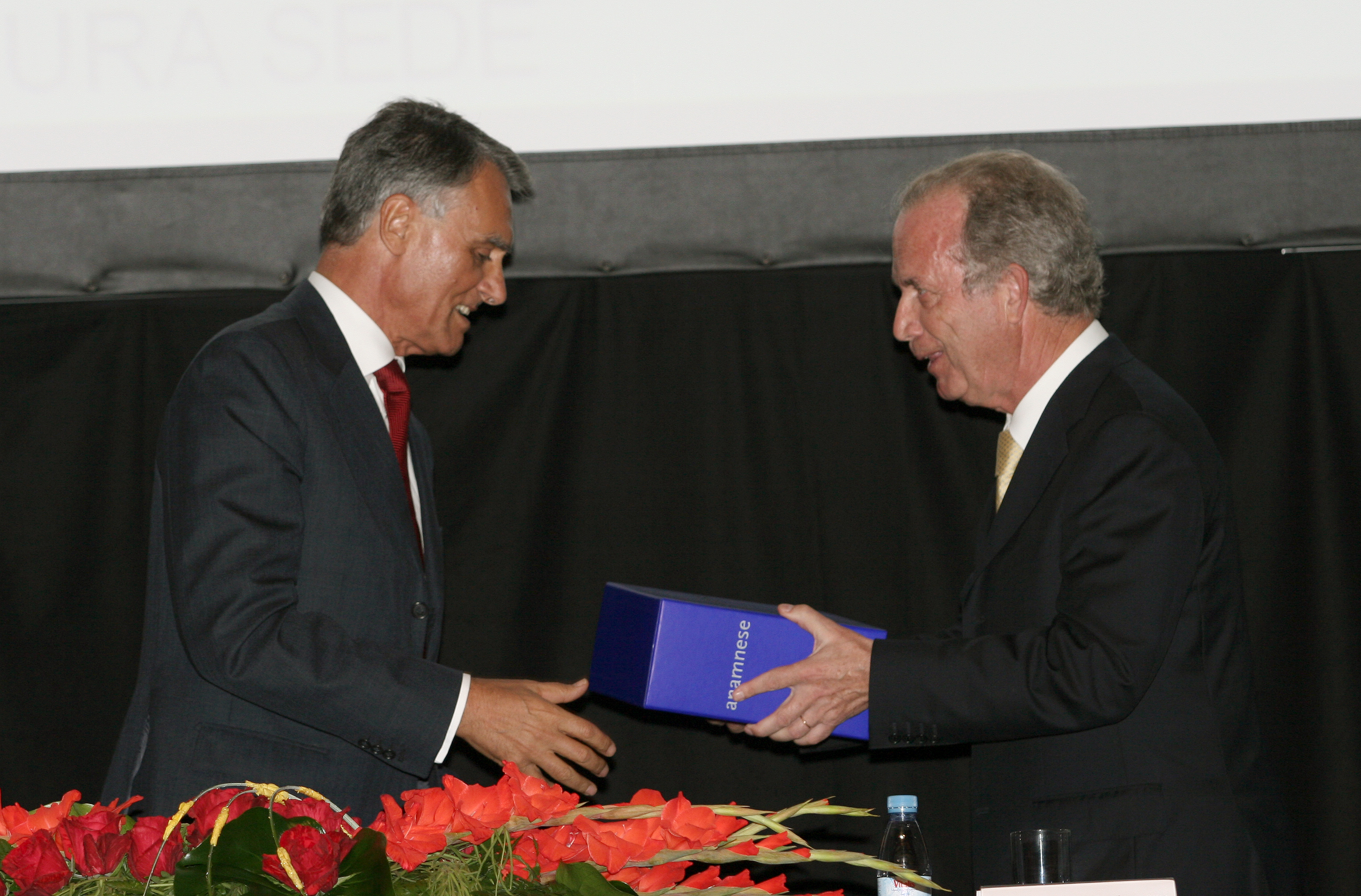 Cavaco Silva na cerimónia de entrega dos livros "Anamnese"